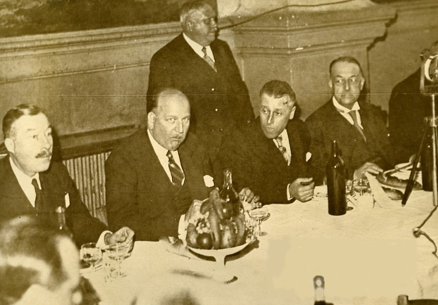 Un banquet tenu par l'Alliance démocratique à Bourg-en-Bresse, le 8 novembre 1936. Pierre-Étienne Flandin regarde l'objectif ; on voit Léon Baréty à droite de la photographie.